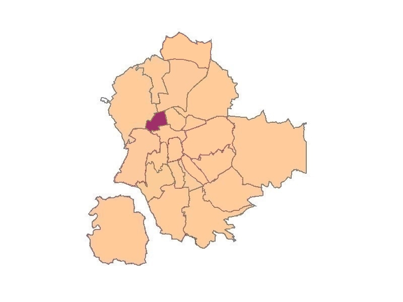 plan de saint-etienne quartier du Jacquard